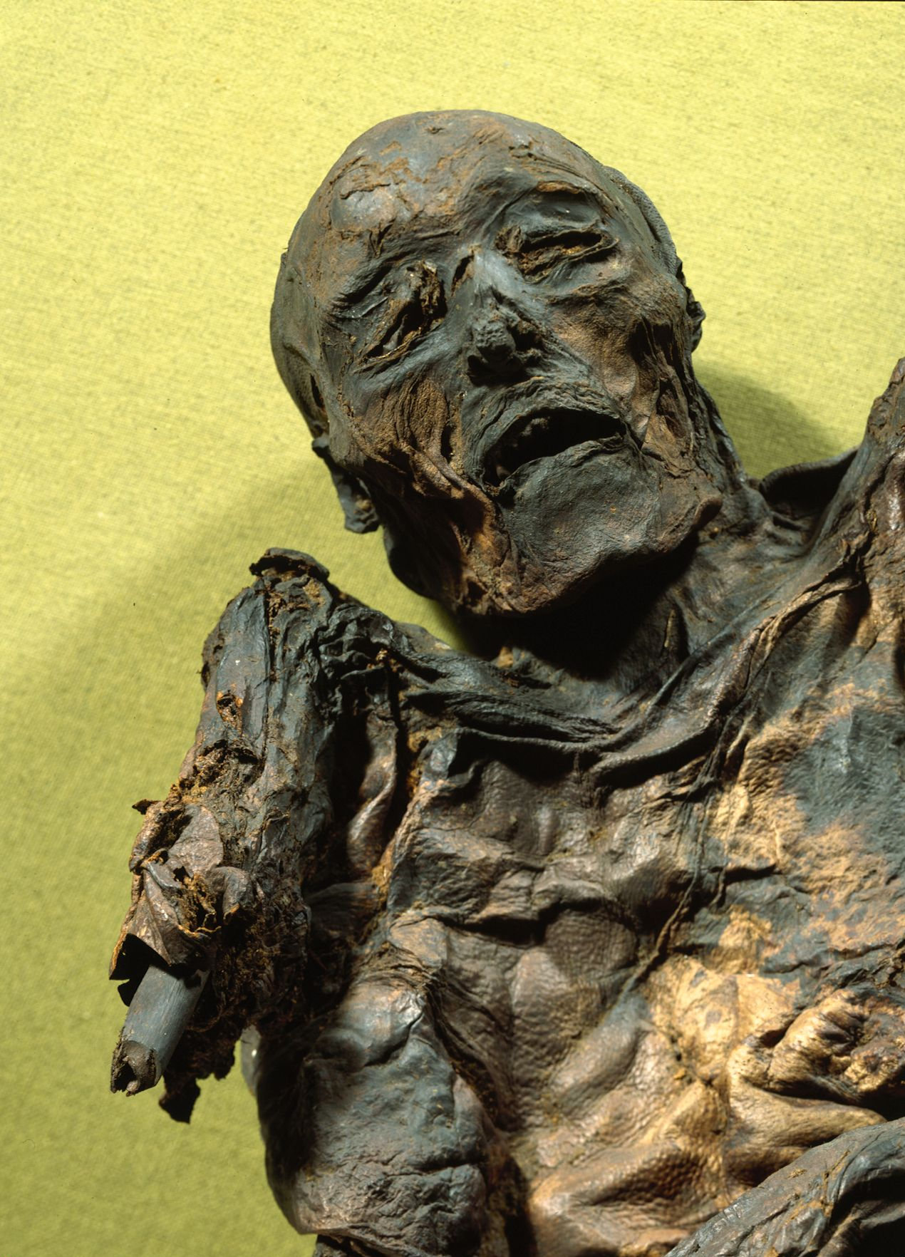 Moselig fra Huldremose, ansigt og arm. Randers Amt. Votiv/depotfund, mosefund. Romersk jernalder.